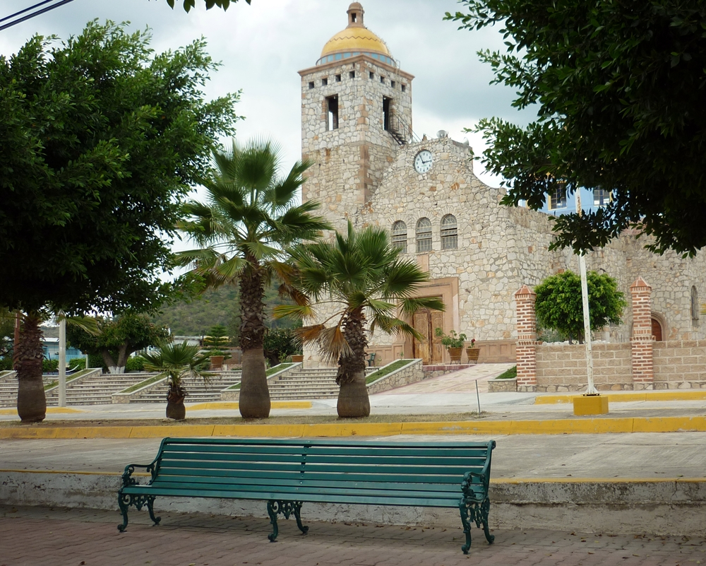 huascato